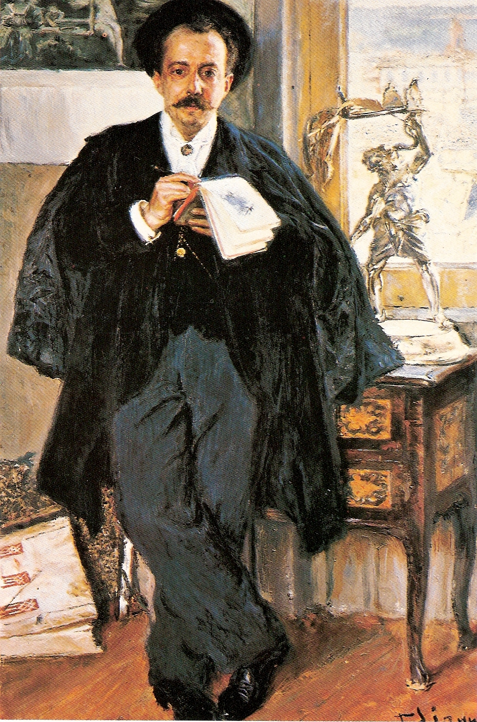 Dipinto del 1895 del giornalista e scrittore Luigi Arnaldo Vassallo